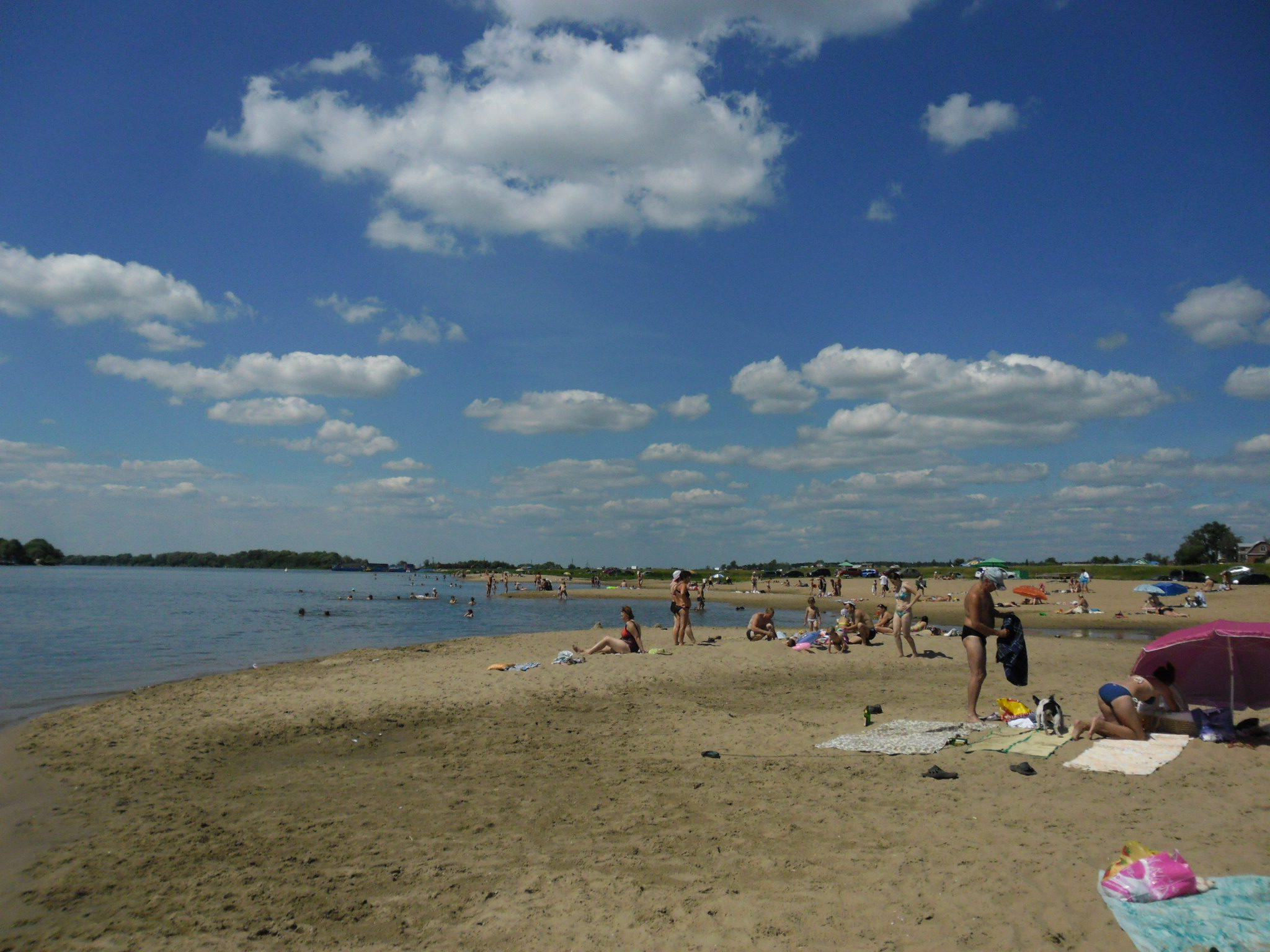 Beloomut, Moskovskaya oblast', Russia, 140520